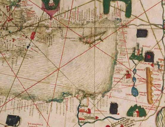 Carta catalana (Mappamondo catalano). Ms. membr., sec. 15., diametro mm 1130. 1452 ?